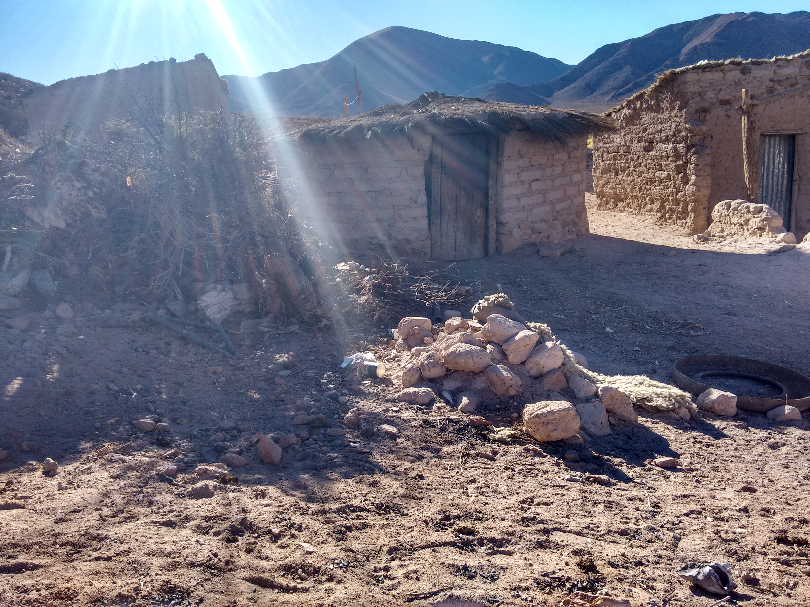 Patrimonio cultural. conjunto. Puesto de flia. en Incahuasi.